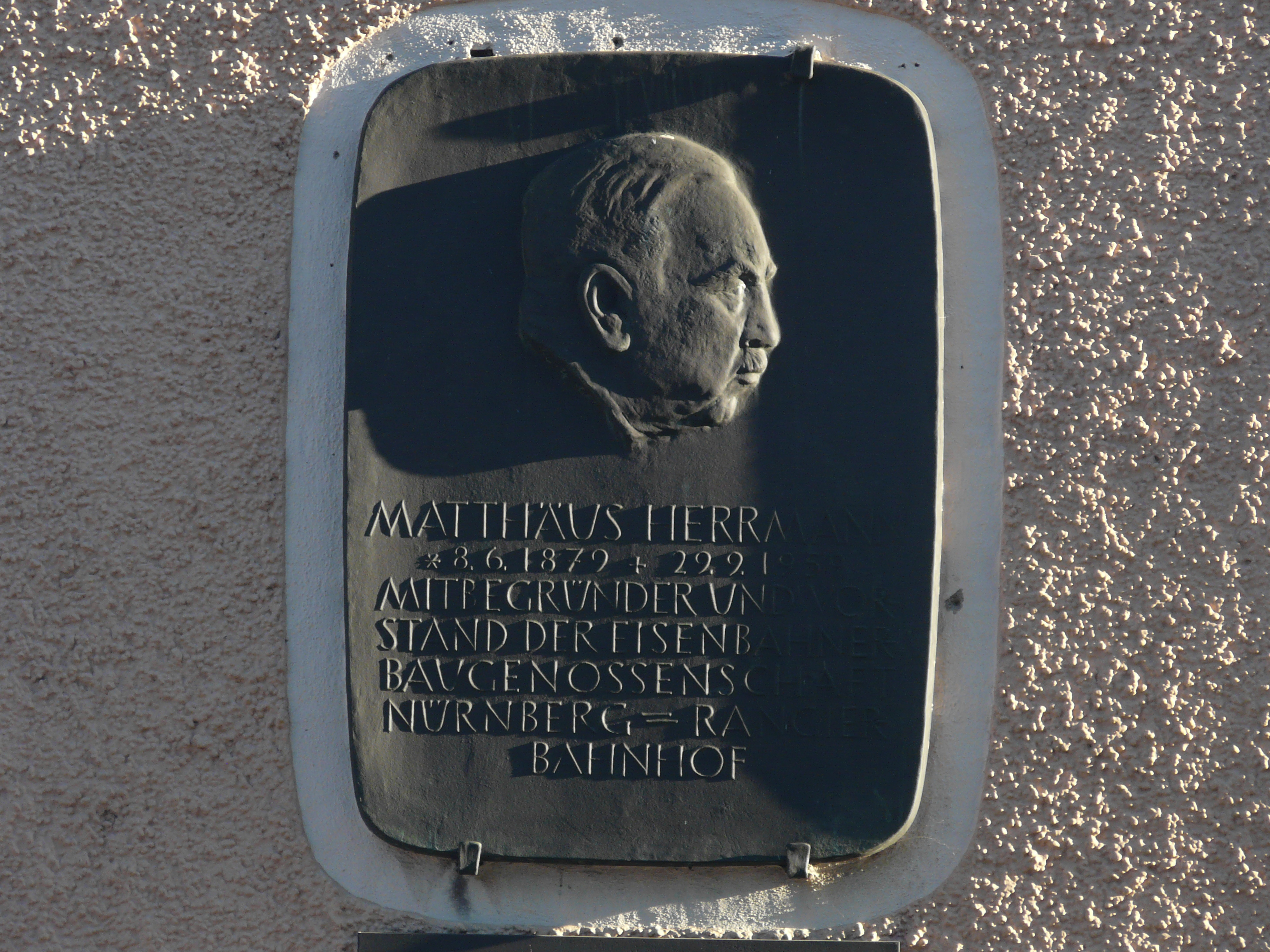 Bronze-Plakette von Matthäus Herrmann an einer Hauswand in der Nürnberger Rangierbahnhof-Siedlung